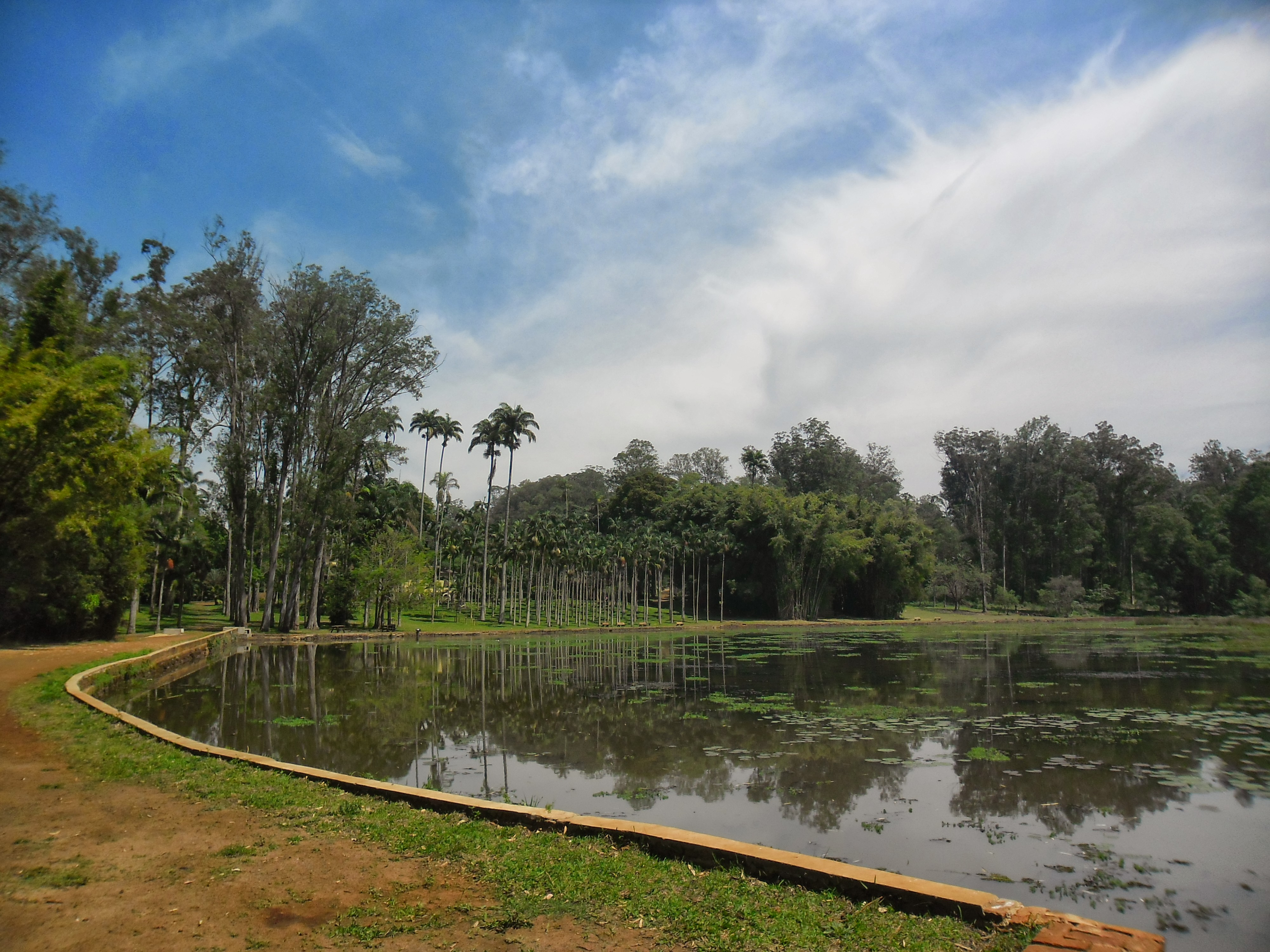 Floresta Estadual Edmundo Navarro de Andrade - Rio Claro